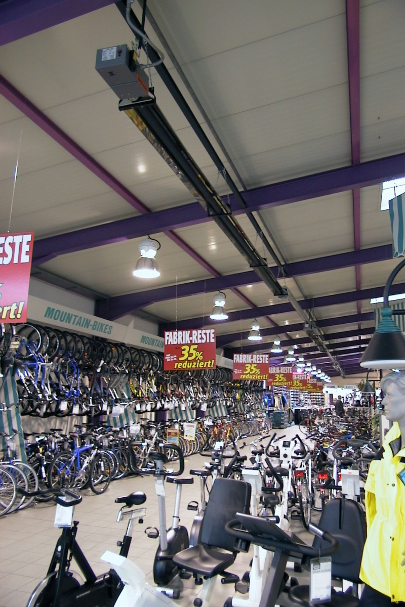 Fahrradverkaufsraum: Beheizung mit Infrarotheizungen